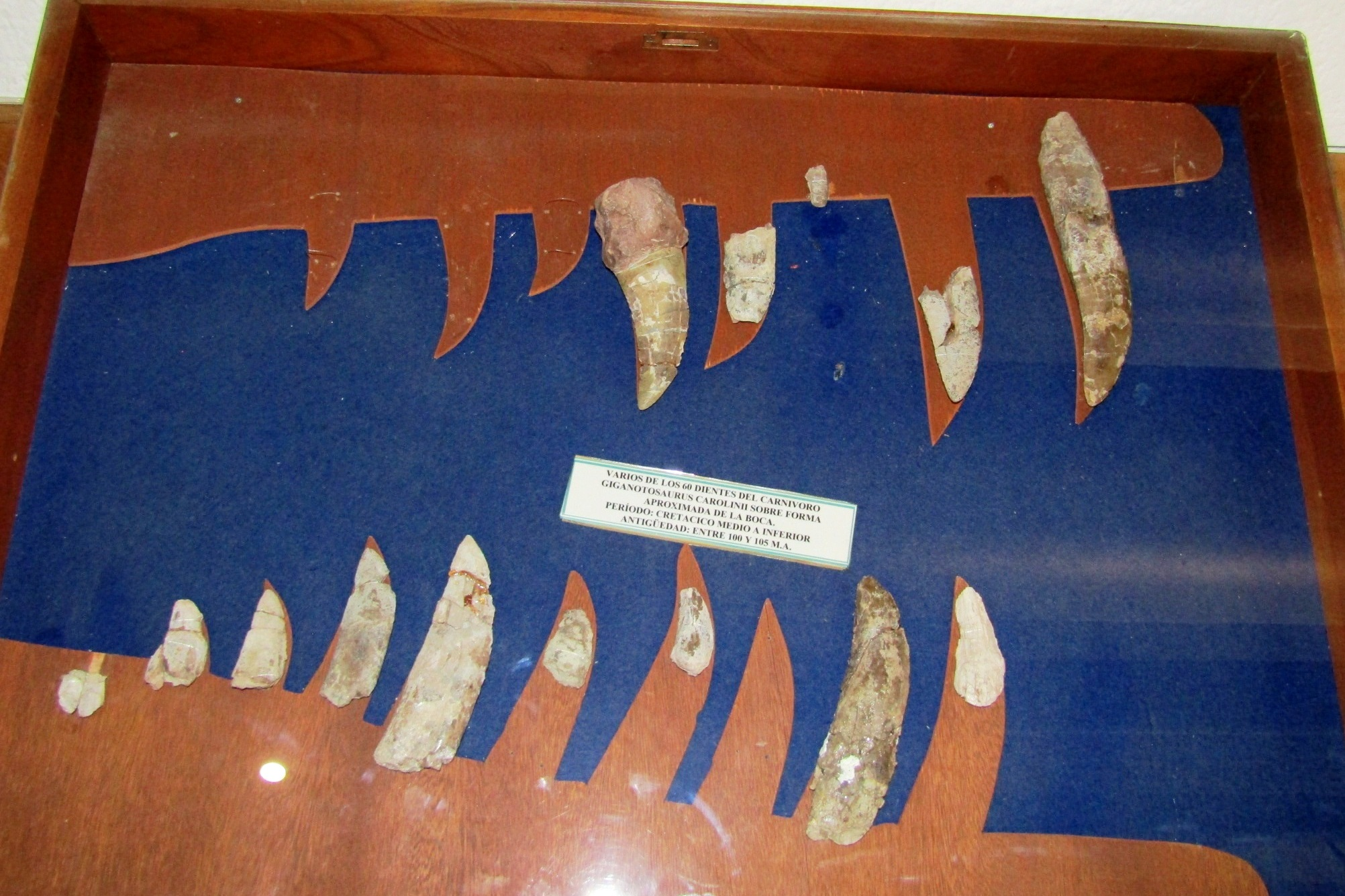 Dientes fósiles de Giganotosaurus carolinii exhibidos en el Museo Paleontológico Ernesto Bachmann, Villa El Chocón, Neuquén, Argentina.